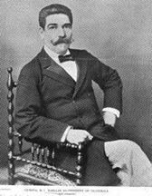 Manuel Lisandro Barillas fotografiado en la década de 1890.